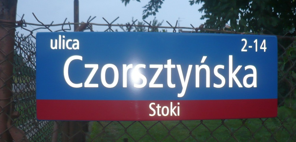 Przykład oznakowania ul. Czorsztyńskiej w Łodzi umocowaną na ogrodzeniu tablicą ulicową Systemu Informacji Miejskiej